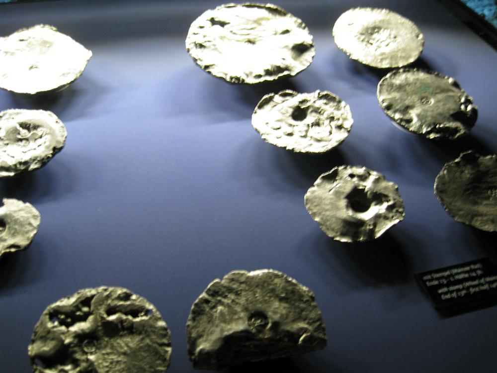 Goldschatz in der Alten Synagoge Erfurt